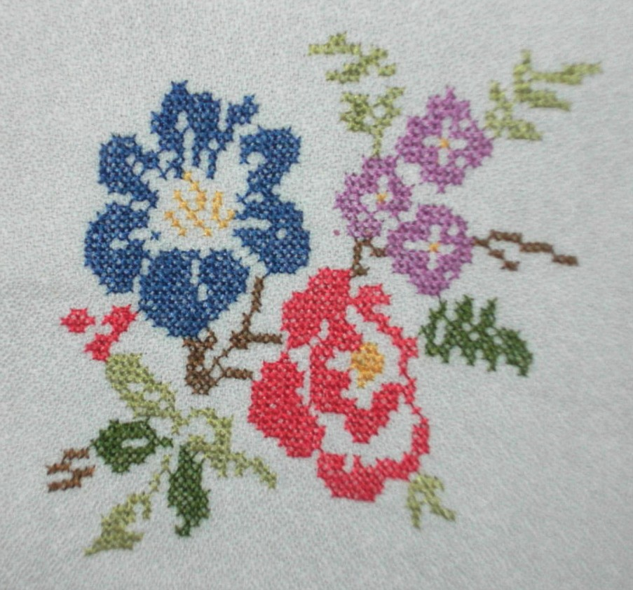 Esquina de un mantel individual de desayuno bordado a punto de cruz.